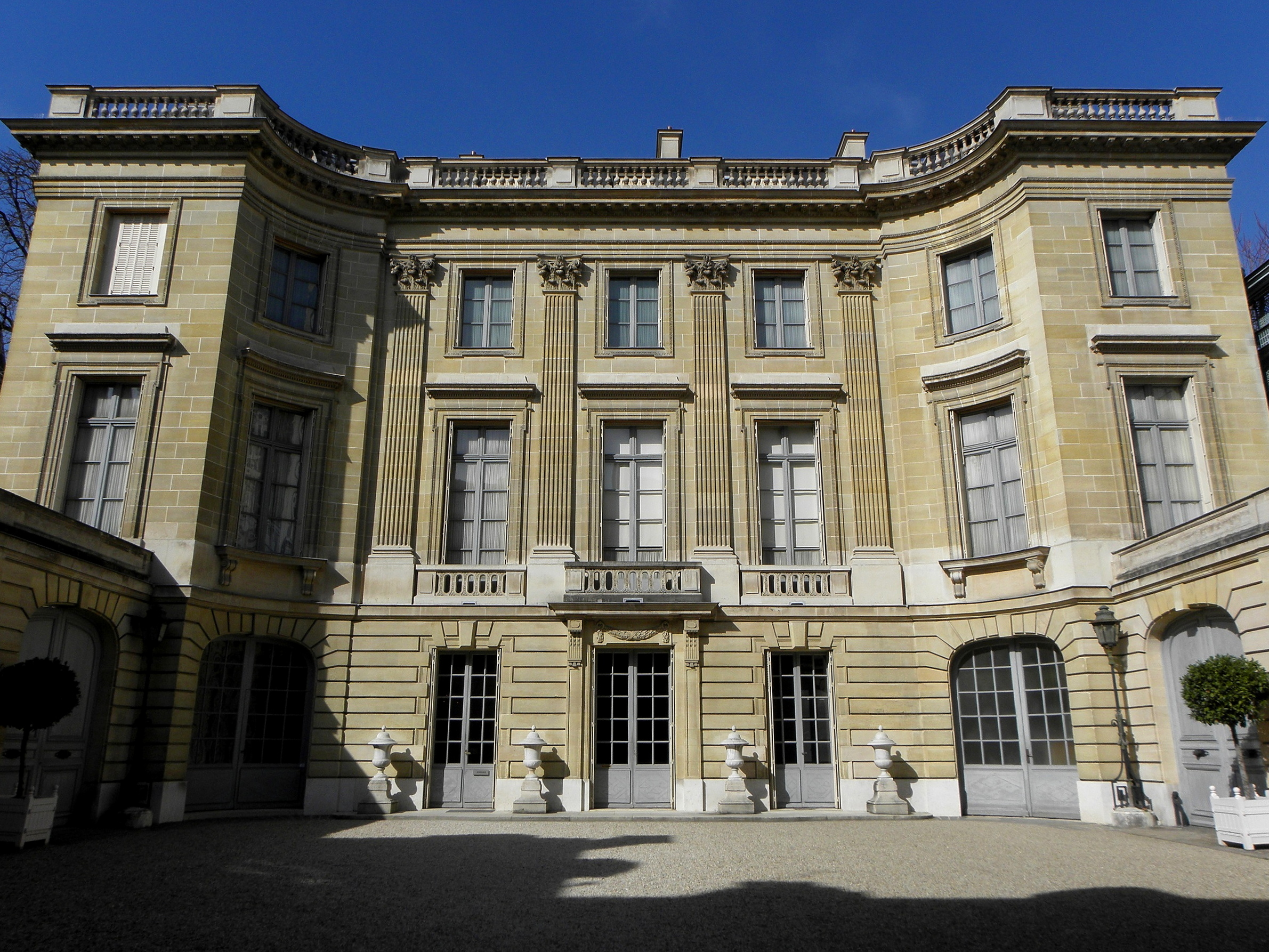 Hôtel Moïse de Camondo à Paris (75008).